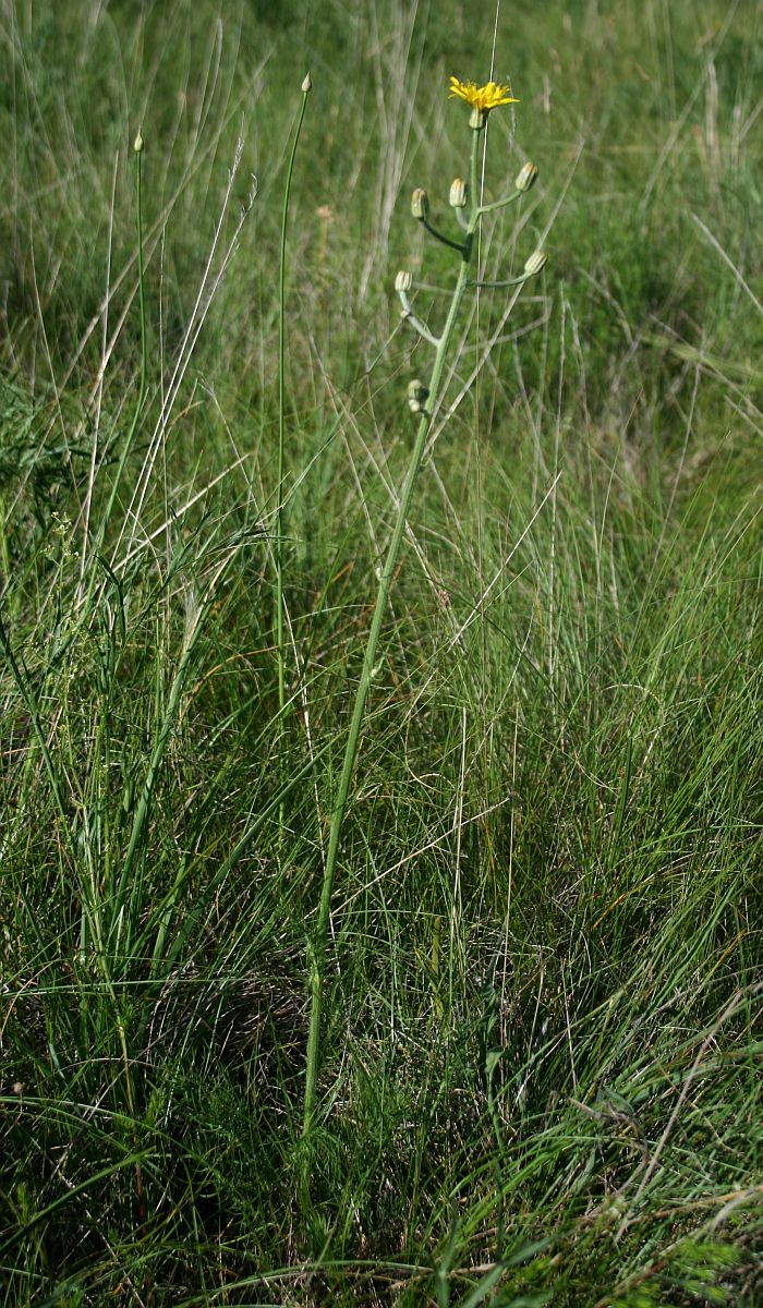 Fenchelblättriger Pippau (Crepis chondrilloides), Korbblütler (Asteraceae) - Slowenien/Slovenija/Slovenia: Primorska, N Podgorje